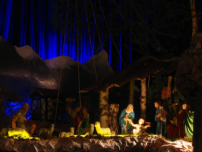 Żłobek franciszkański w Wejherowie.